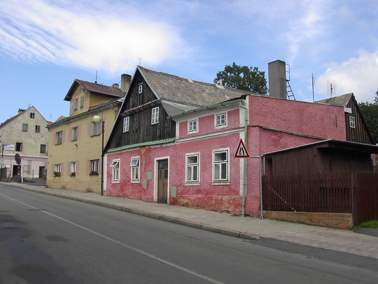 Fucik street in Tepla, Czech Republic. Fučíkova ulice v Teplé s zajímavým ale zchátralým domem.